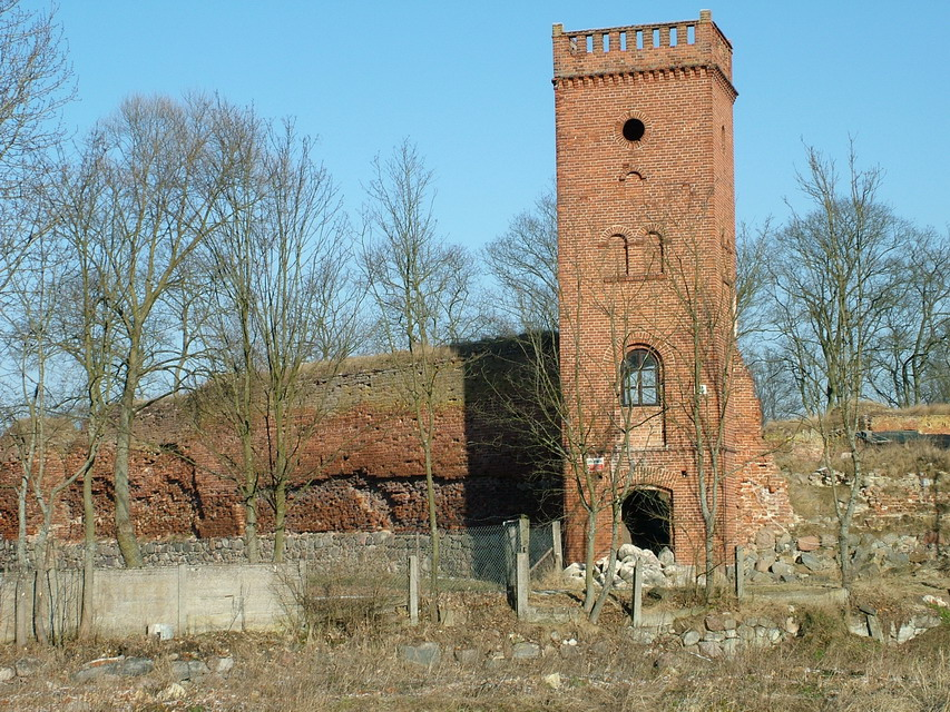 Zamek Kiszewski - 5 marca 2005